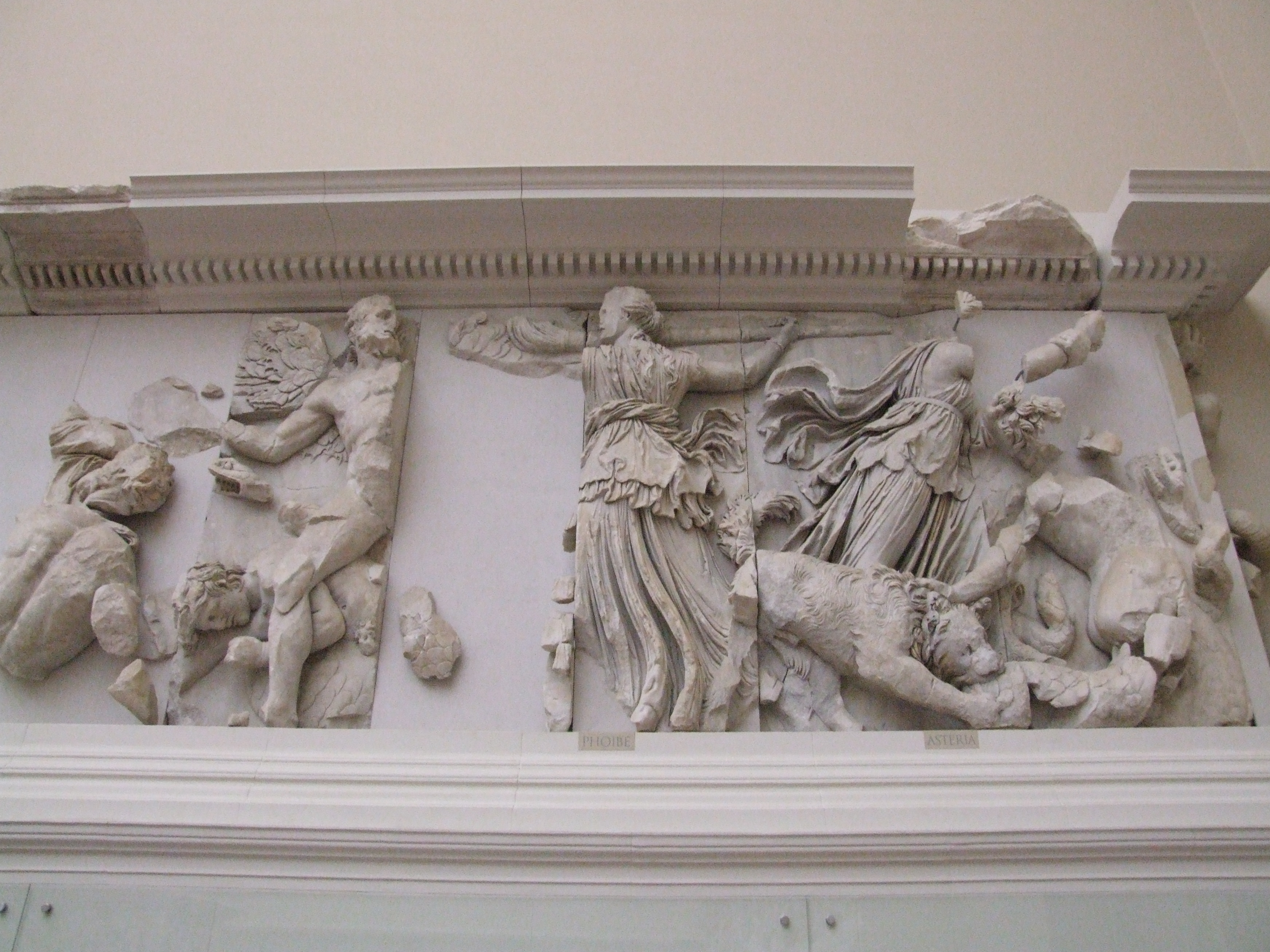 Pergamonmuseum Berlin, Pergamonaltar, Gigantomachie, Phoibe, Asteria